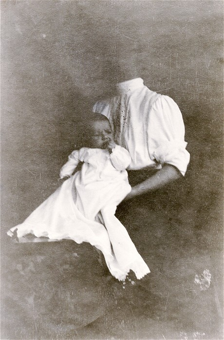 Неизвестный фотограф II половины XIX века. Спрятанная мать.